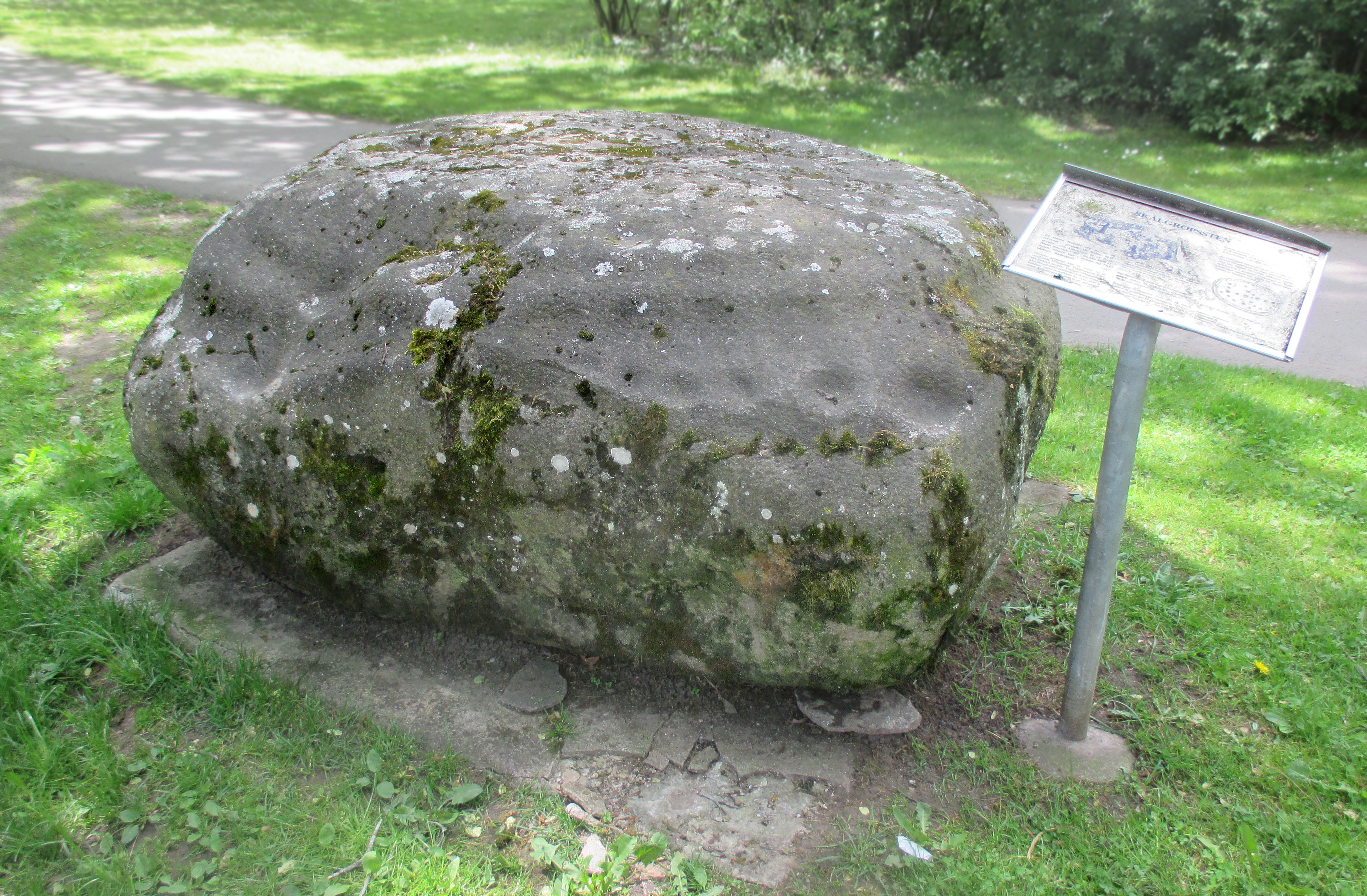 Skålgropsstenen Ballersten (RAÄ-nummer Falköping 29:1) i Planteringsförbundets park, Falköping, Falköpings kommun, f.d. Skaraborgs län, Västergötland, Västra Götalands län, Sverige.